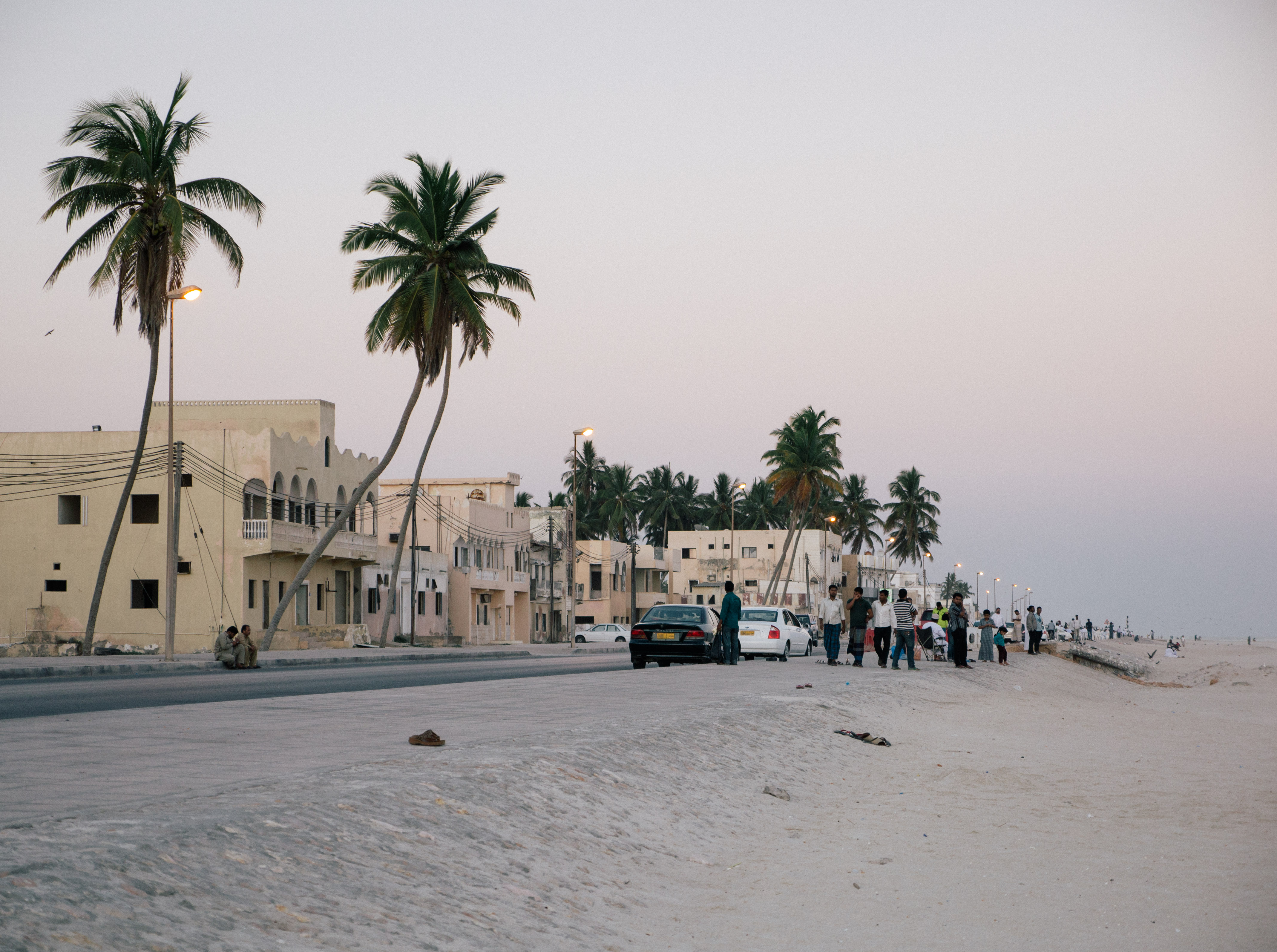 Salalah, Oman.